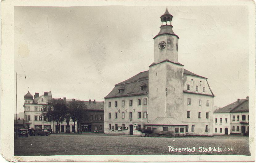 Náměstí v Rýmařově s radnici na pohlednici prošlé v roce 1930